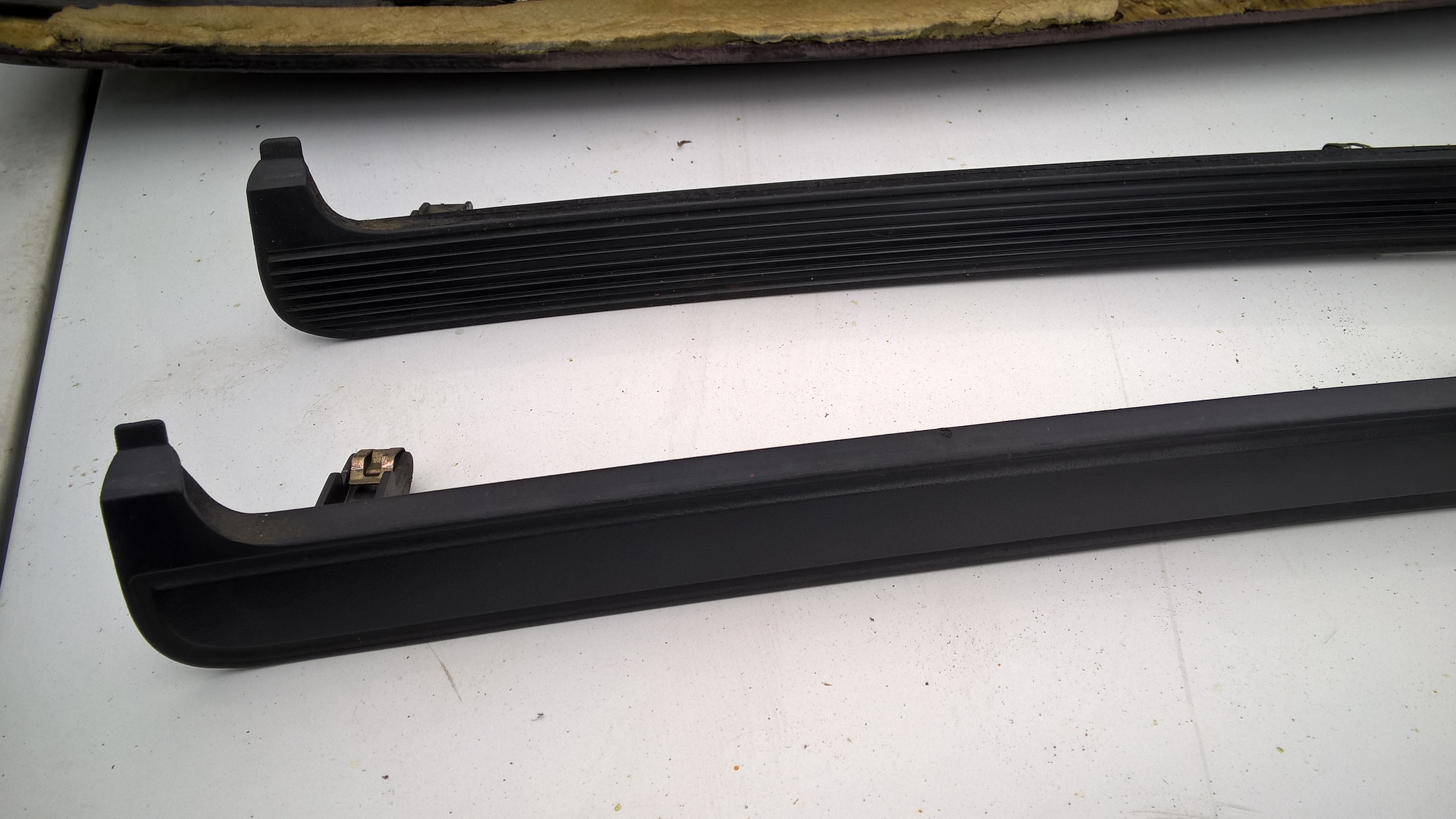 TOYOTA Vista V20 Вставка в торпедо